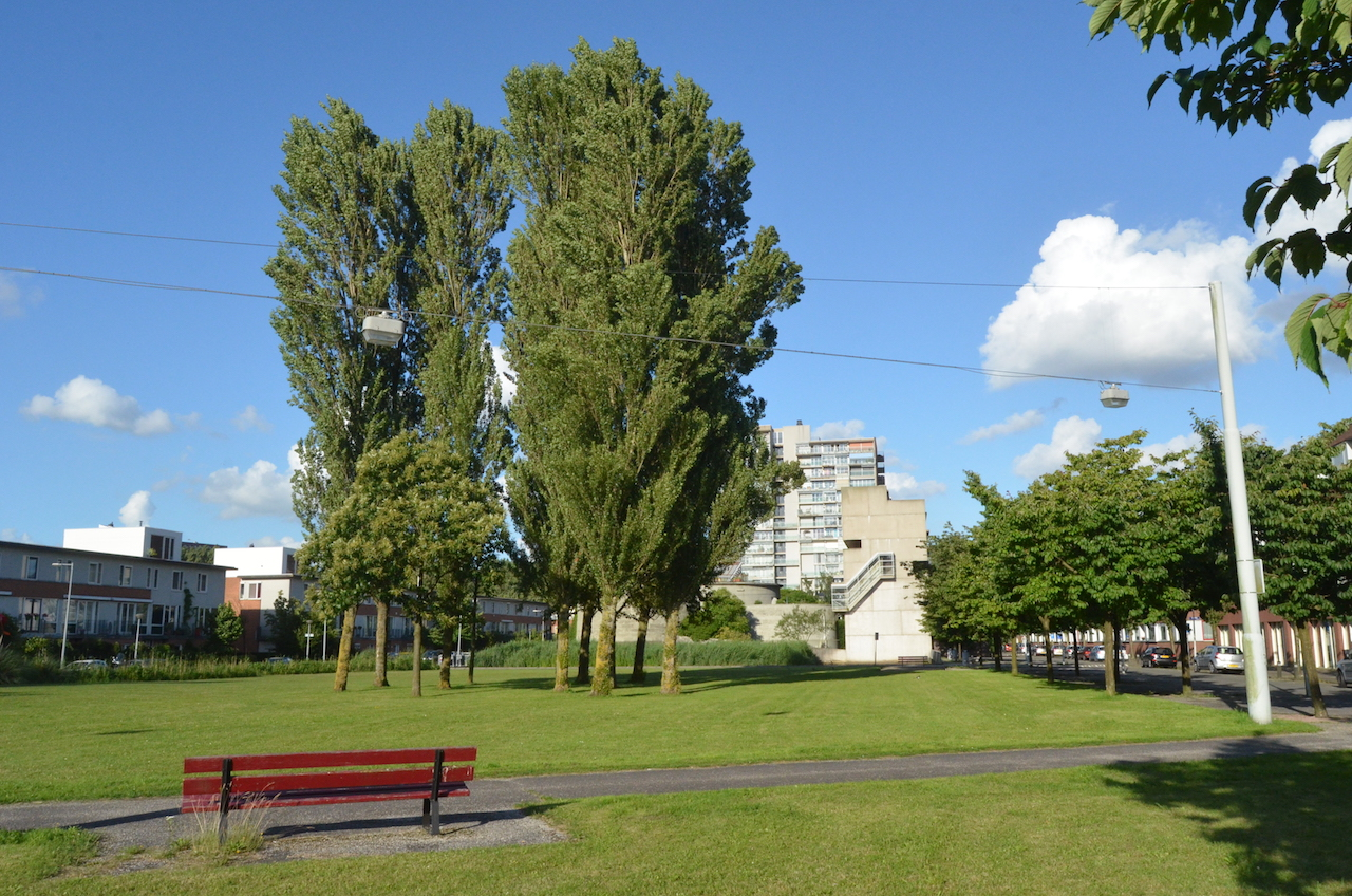 Kröller-Müllerpark. Foto: Erik Swierstra.